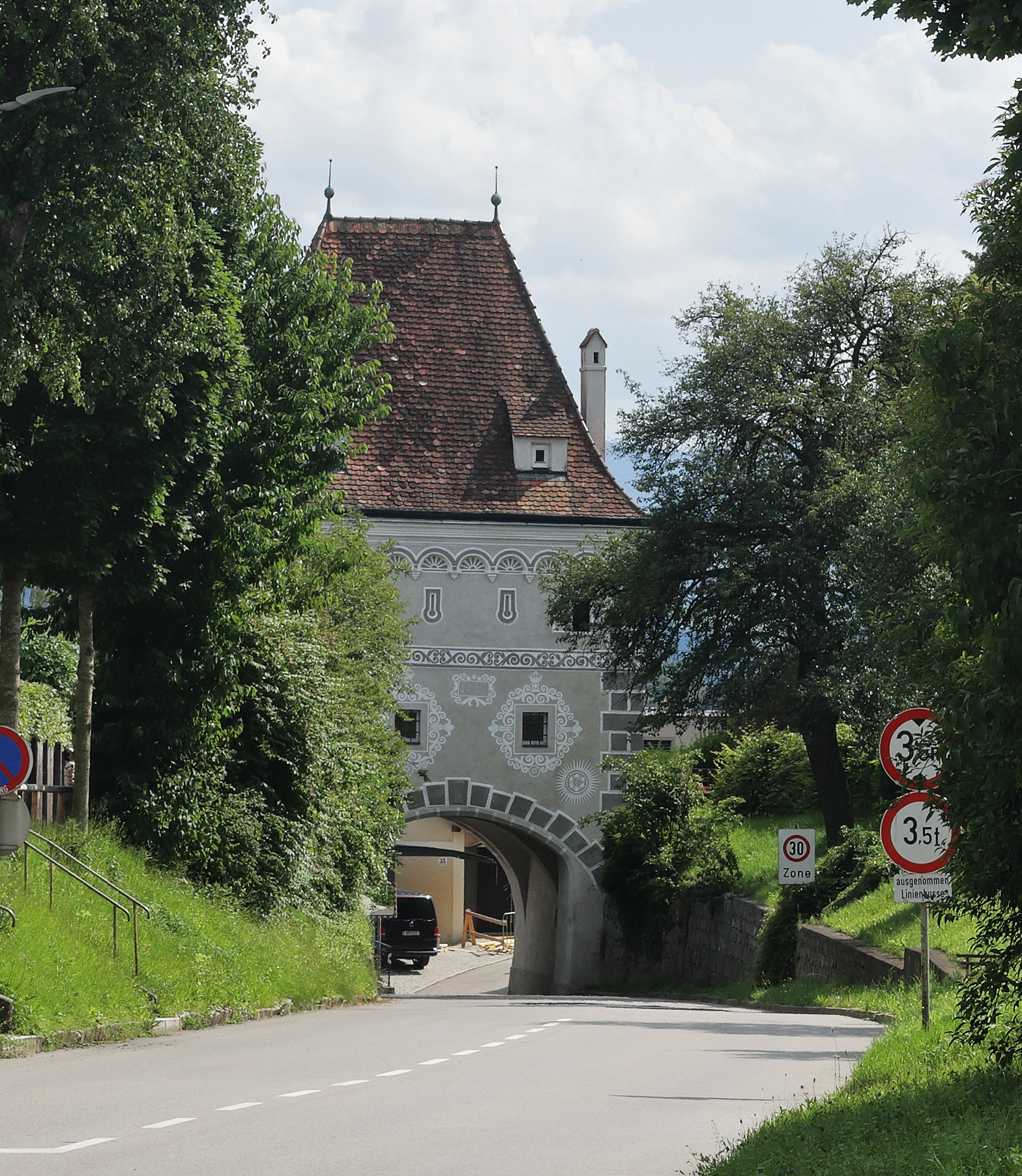 Nordfassade des Steyrer Schnallentors, mit der Franklin-D.-Roosevelt-Straße